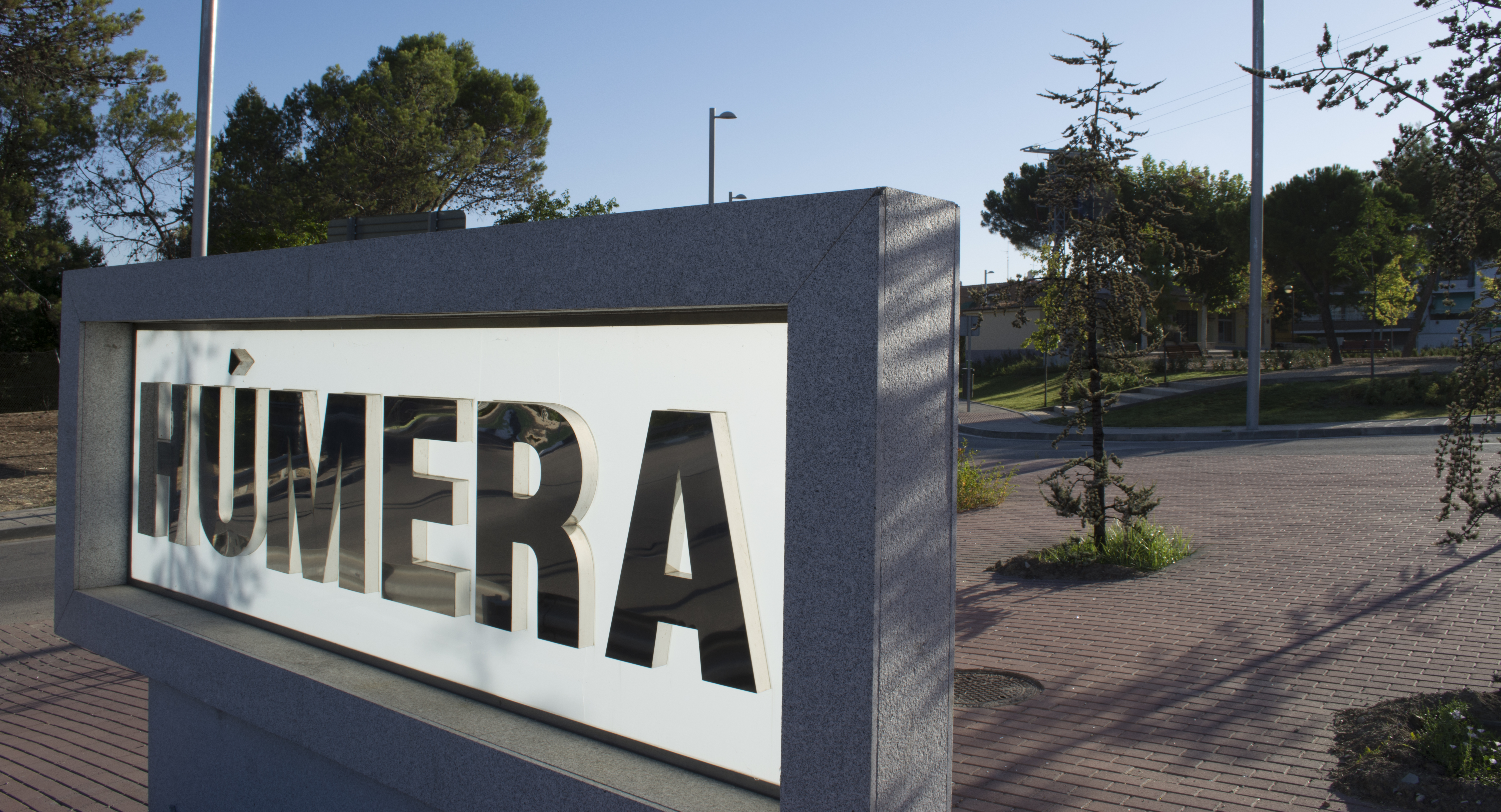 Cartel situado en el acceso al barrio de Húmera, perteneciente al municipio de Pozuelo de Alarcón.